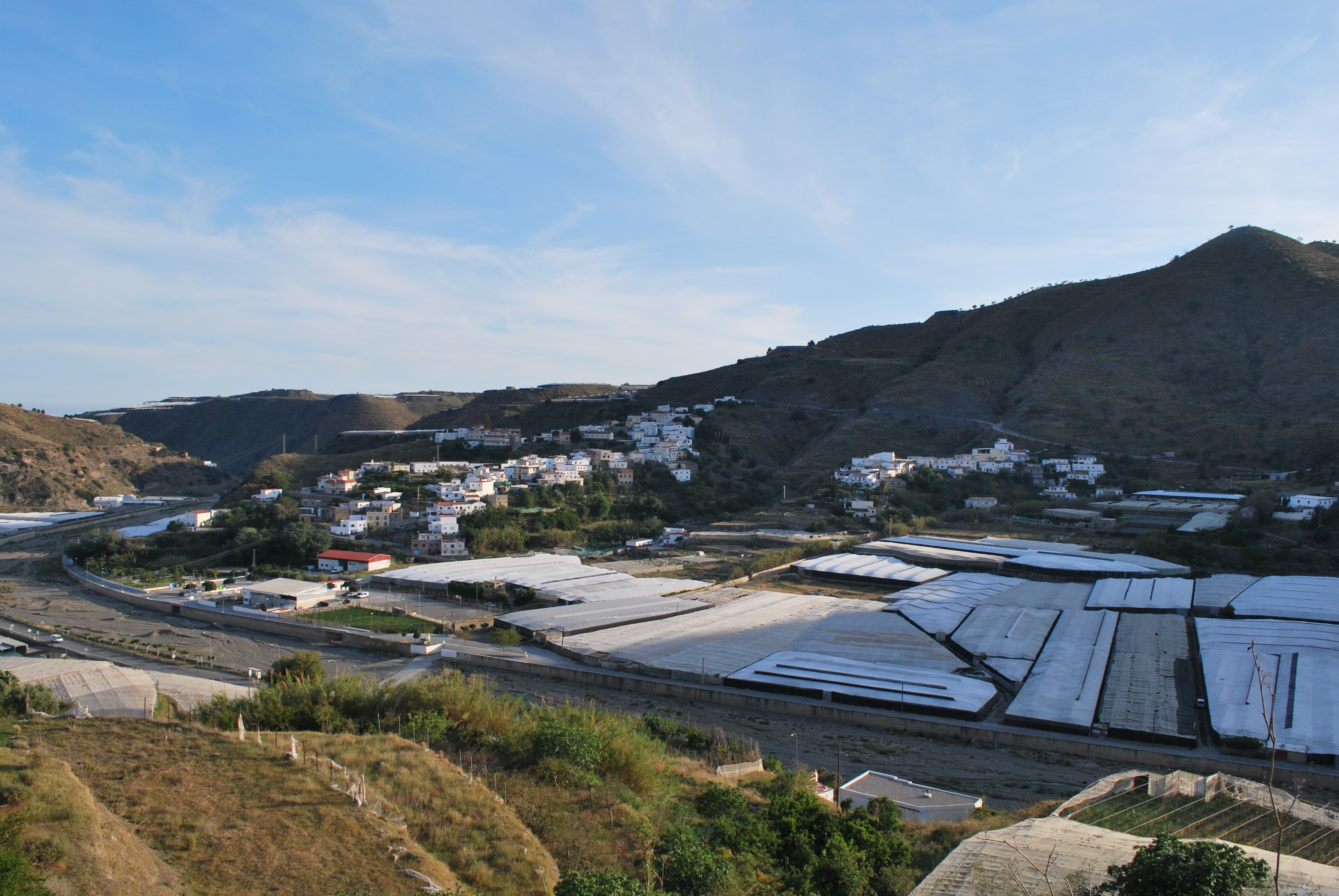 Pedanías de Los Castillas (Izquierda) y Cortijo Bajo (Derecha) Municipio de Albuñol (Granada)